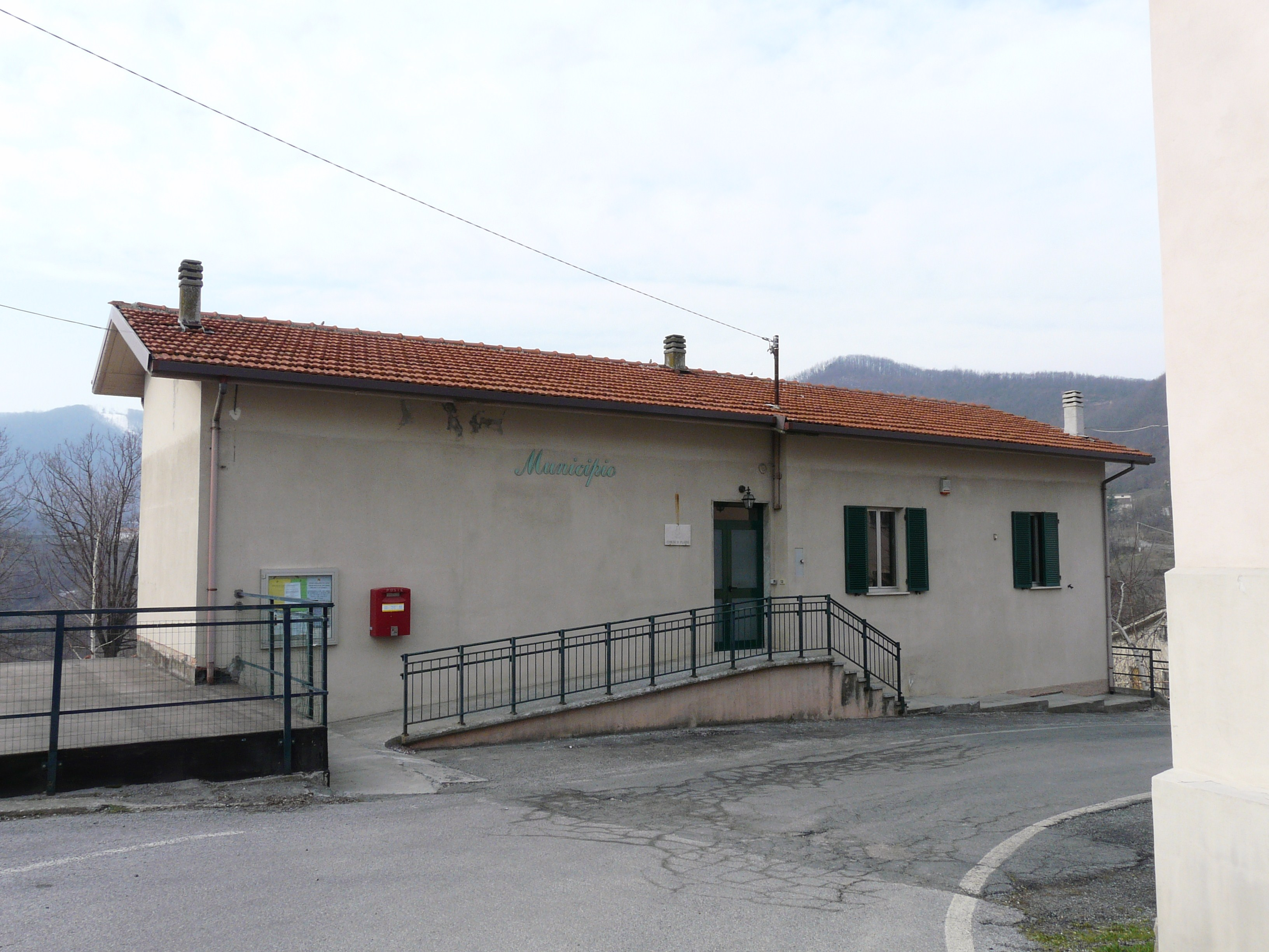 Municipio, Plodio, Liguria, Italia